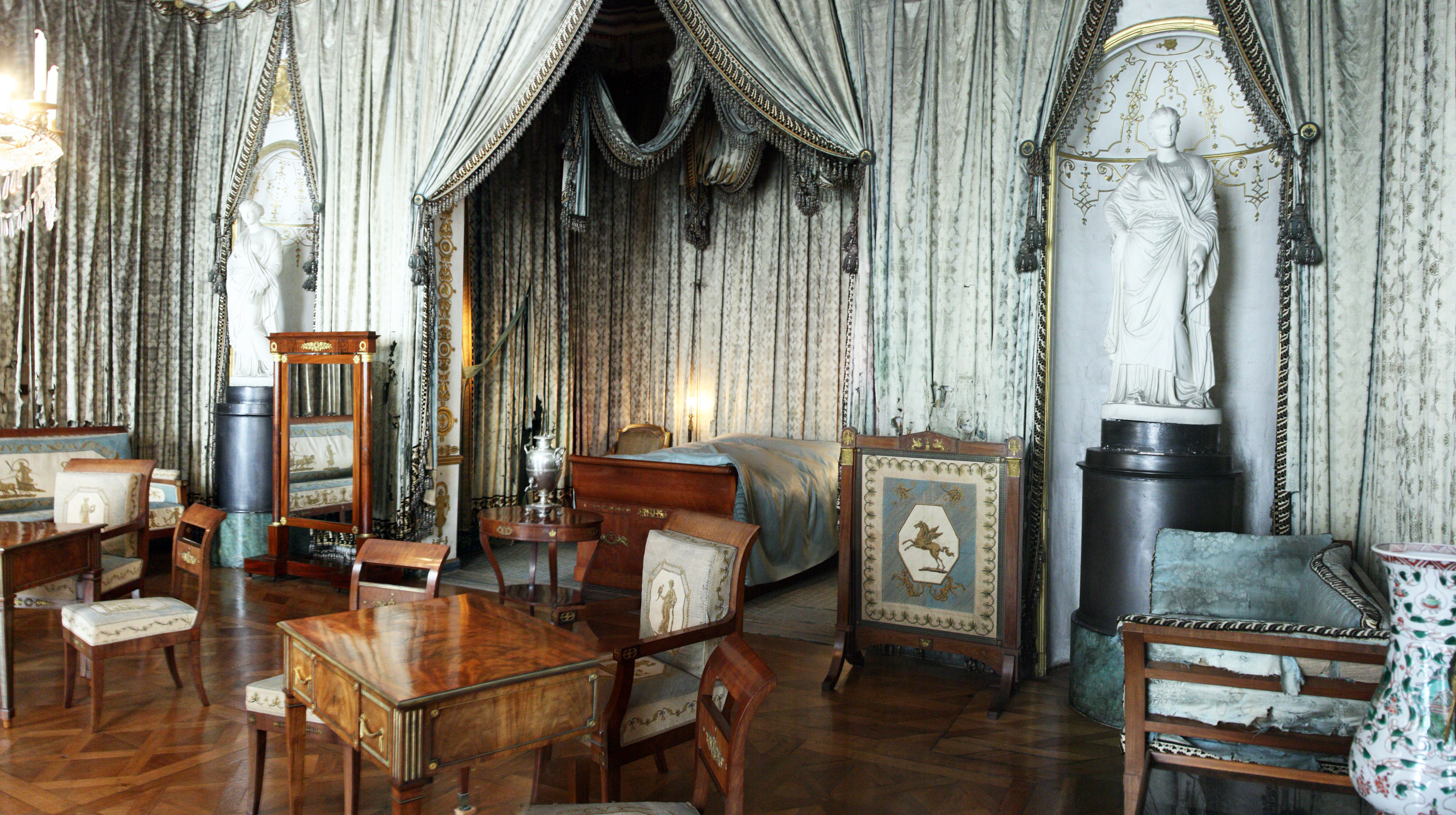 Schlafzimmer des Königs Friedrich I. von Württemberg im Residenzschloss Ludwigsburg